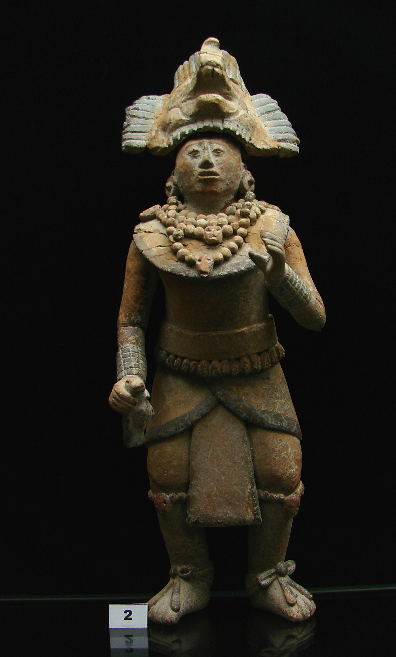 Statuette maya.Musée d'Auch.